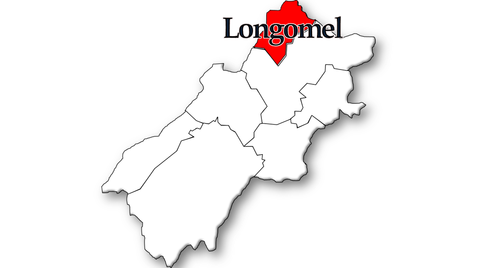 Evolução da População